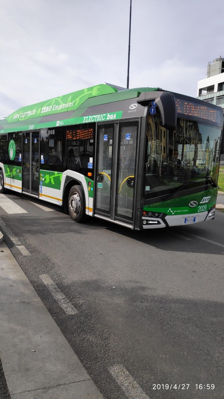 Autobus elettrico della linea 84 (Largo Augusto - San Donato M3) di ATM in funzione dal 2018 e fotogragato a cavallo tra il quartiere Santa Giulia e Rogoredo